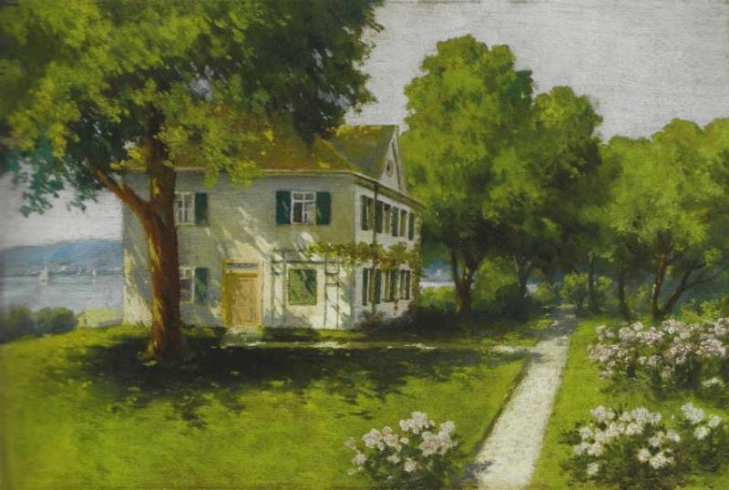 картины турецкого художника Ходжа Али Рыза (1858-1930)